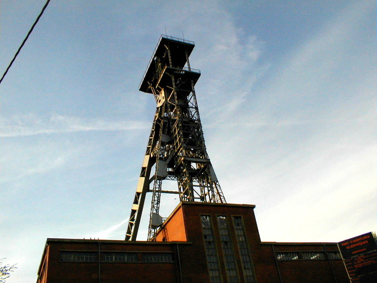 Chassis à molette de Crachet à Frameries vue large